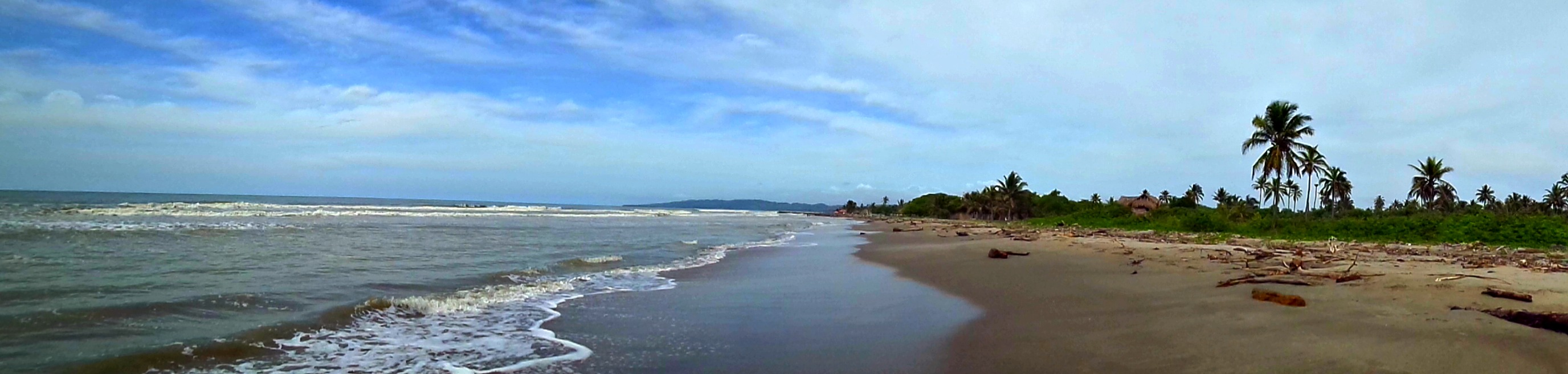 Corregimiento de Uveros